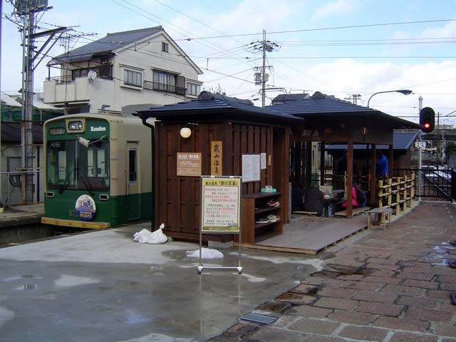 京福電気鉄道嵐山駅 構内足湯 （2005年2月3日投稿者が撮影）